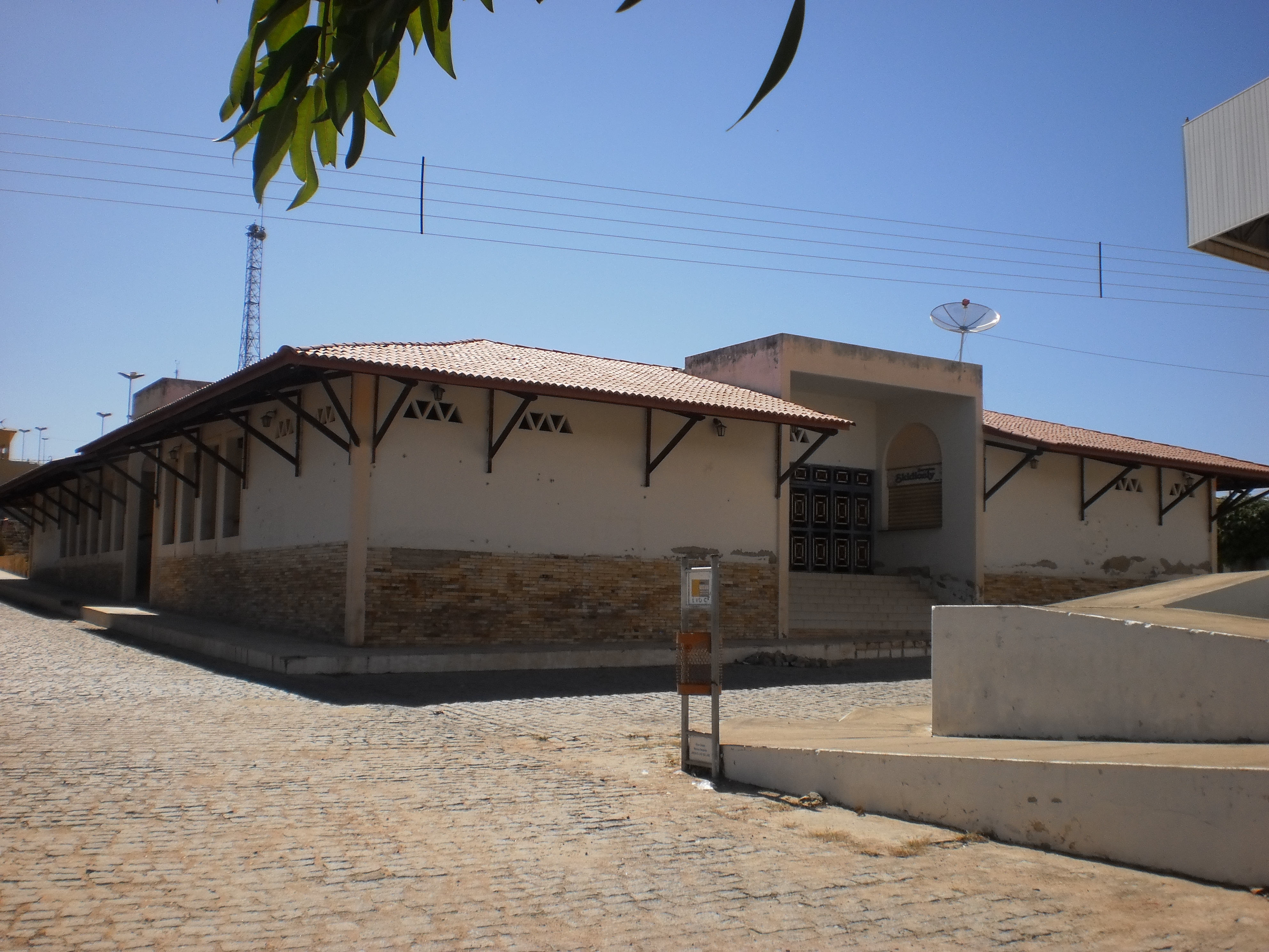 Mercado Público Municipal de Riacho de Santana - Rio Grande do Norte, Brasil.